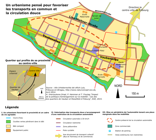 Carte des mobilités de l'écoquartier de Vauban (Fribourg-en-Brisgau)